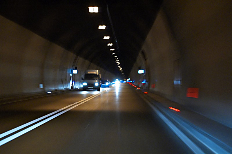 Ucka Tonnel Inside, Croatia